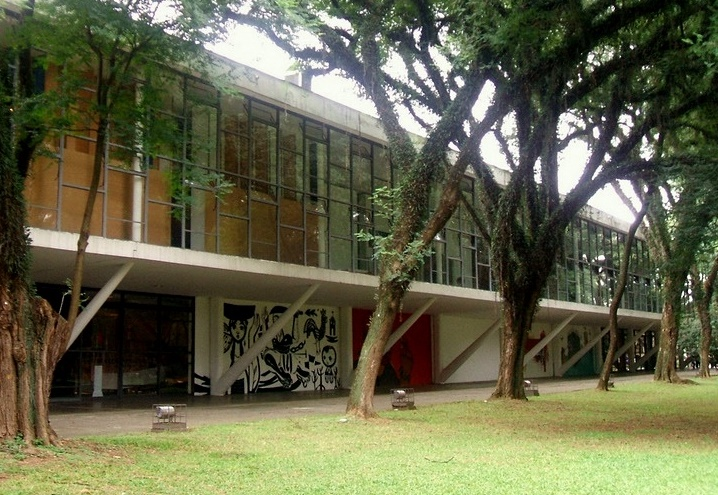 Museu Afro Brasil, no Parque do Ibirapuera, cidade de São Paulo.